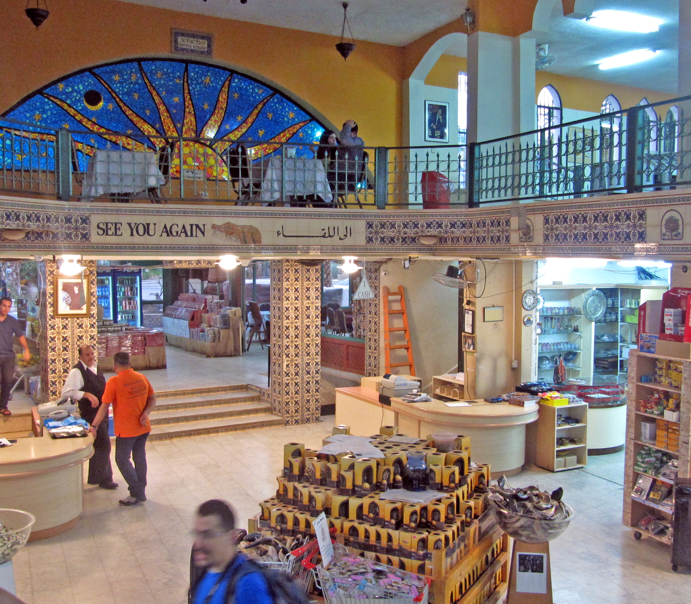 Jericho (more details in the photo's title) יריחו (מידע נוסף בשם הקובץ)